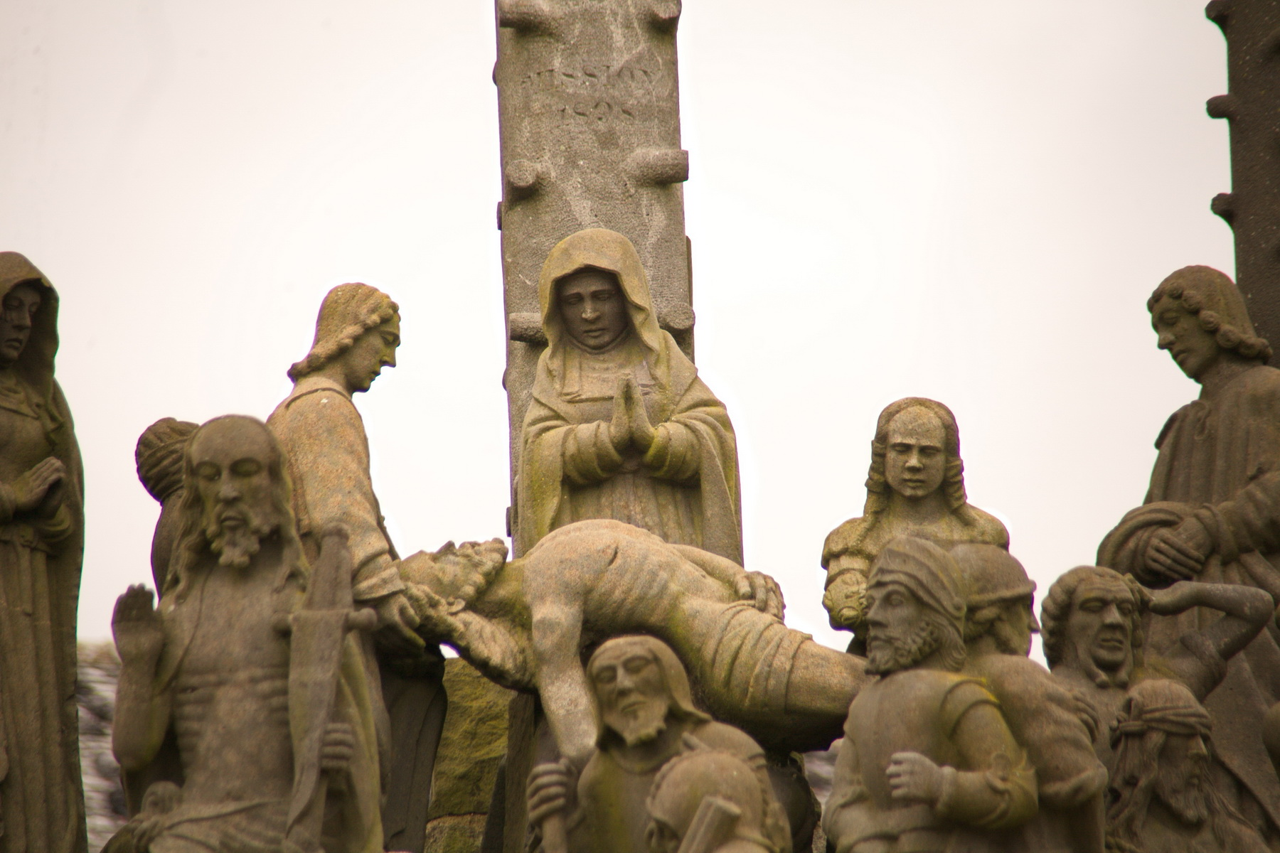 Enclos paroissial de Plougonven (Classé) .